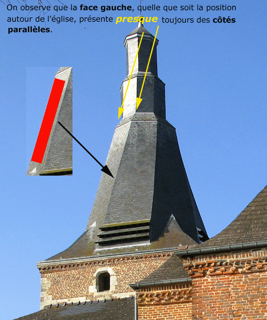 Dohis (Aisne, France) - L'église fortifiée est surmontée d'un «clocher tors» qui présente la particularité de faire profiter l'observateur (quels que soient son angle de vue ou sa position autour de l'édifice) d'un effet d'optique. La face la plus à gauche de la partie inclinée de la flèche du clocher semble avoir des arêtes parallèles. En fait, l'observateur voit presque toujours à gauche un parallélogramme !